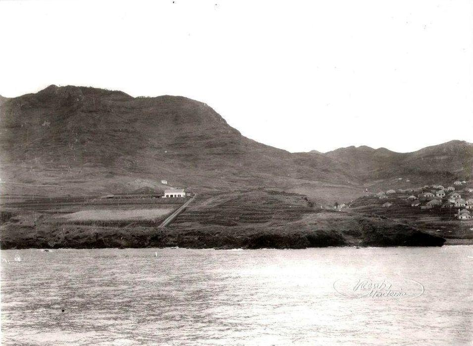 Caniçal. Fotografia, 1930 (c.). Photographia-Museu Vicentes. Caniçal, ilha da Madeira.